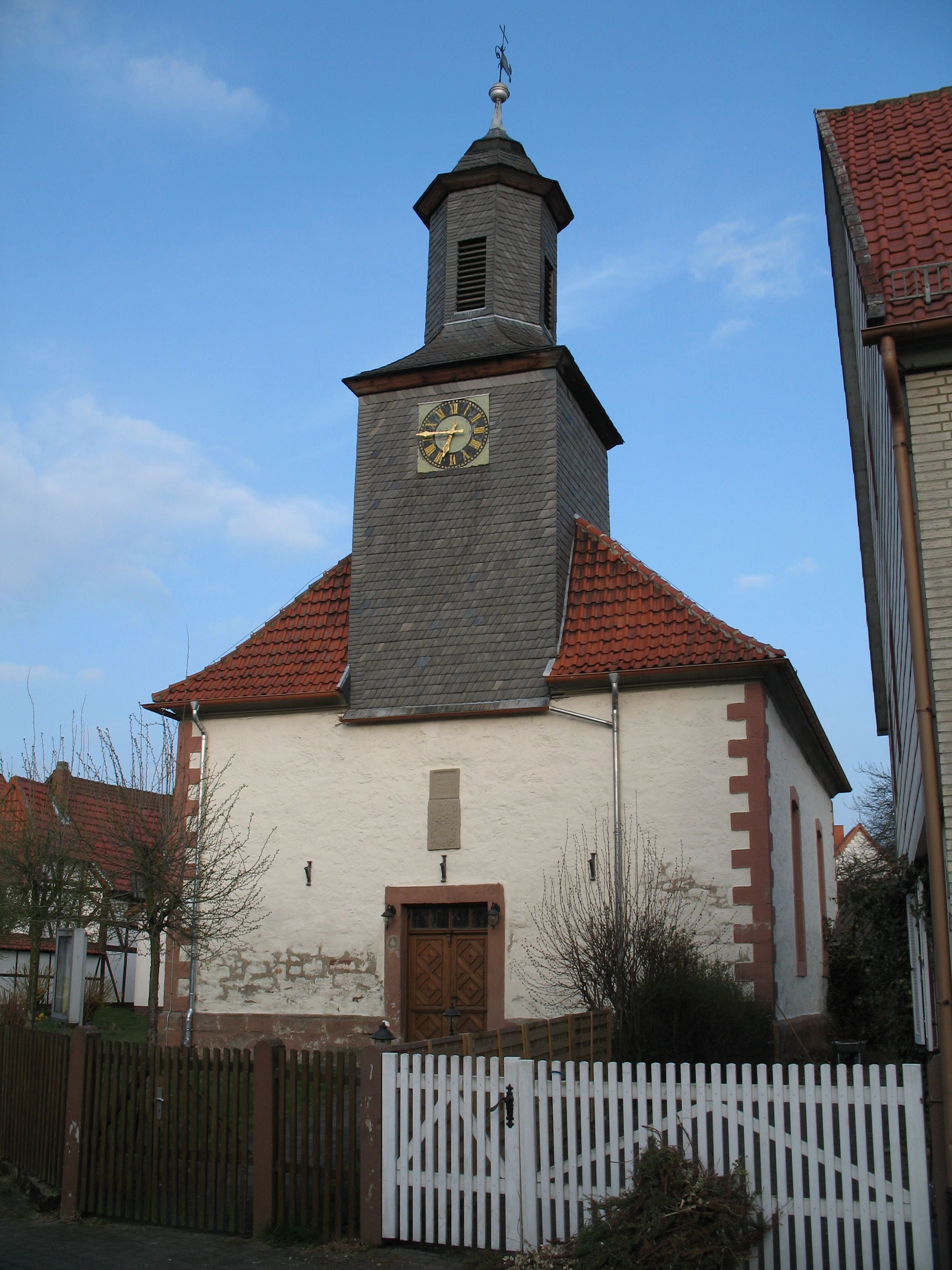 Evangelische Kirche in Angerstein, Landkreis Nörten-Hardenberg, Niedersachsen